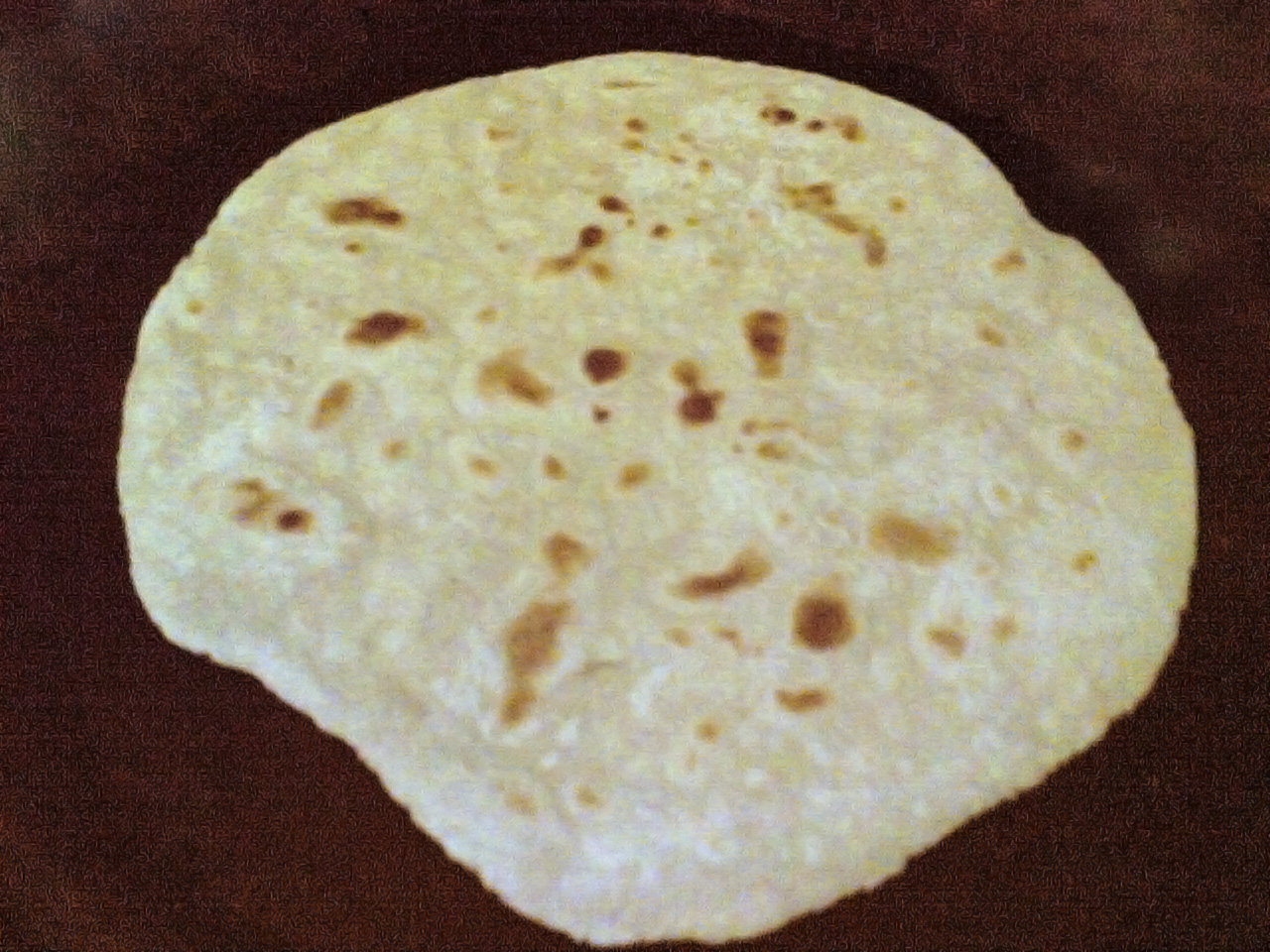 ചൂടുള്ള ചട്ടിയിൽ ചുട്ടെടുത്തത്.